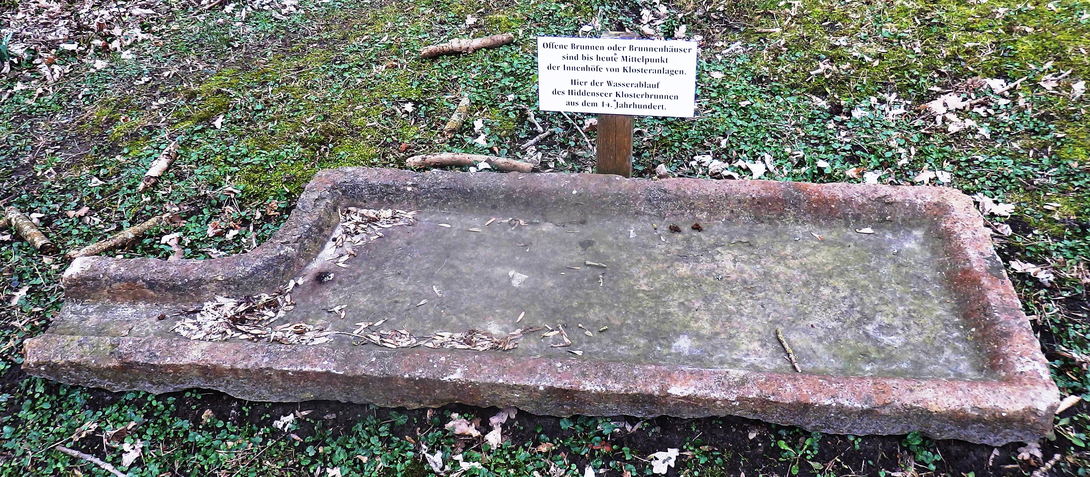 Wasserablauf des Hiddenseer Klosterbrunnens, 14. Jh., liegt heute gegenüber dem Friedhof von Kloster